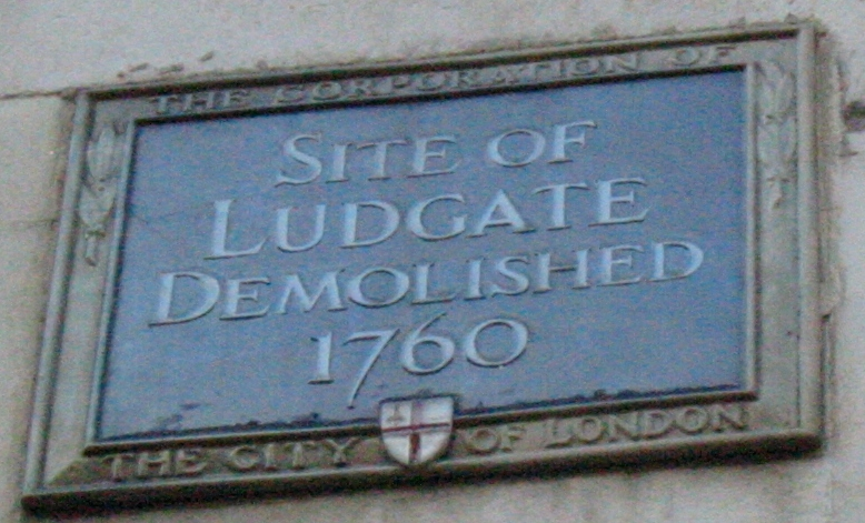 Nrf: Pliaque à Londres